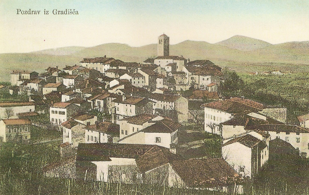 Razglednica Gradišča nad Prvačino.